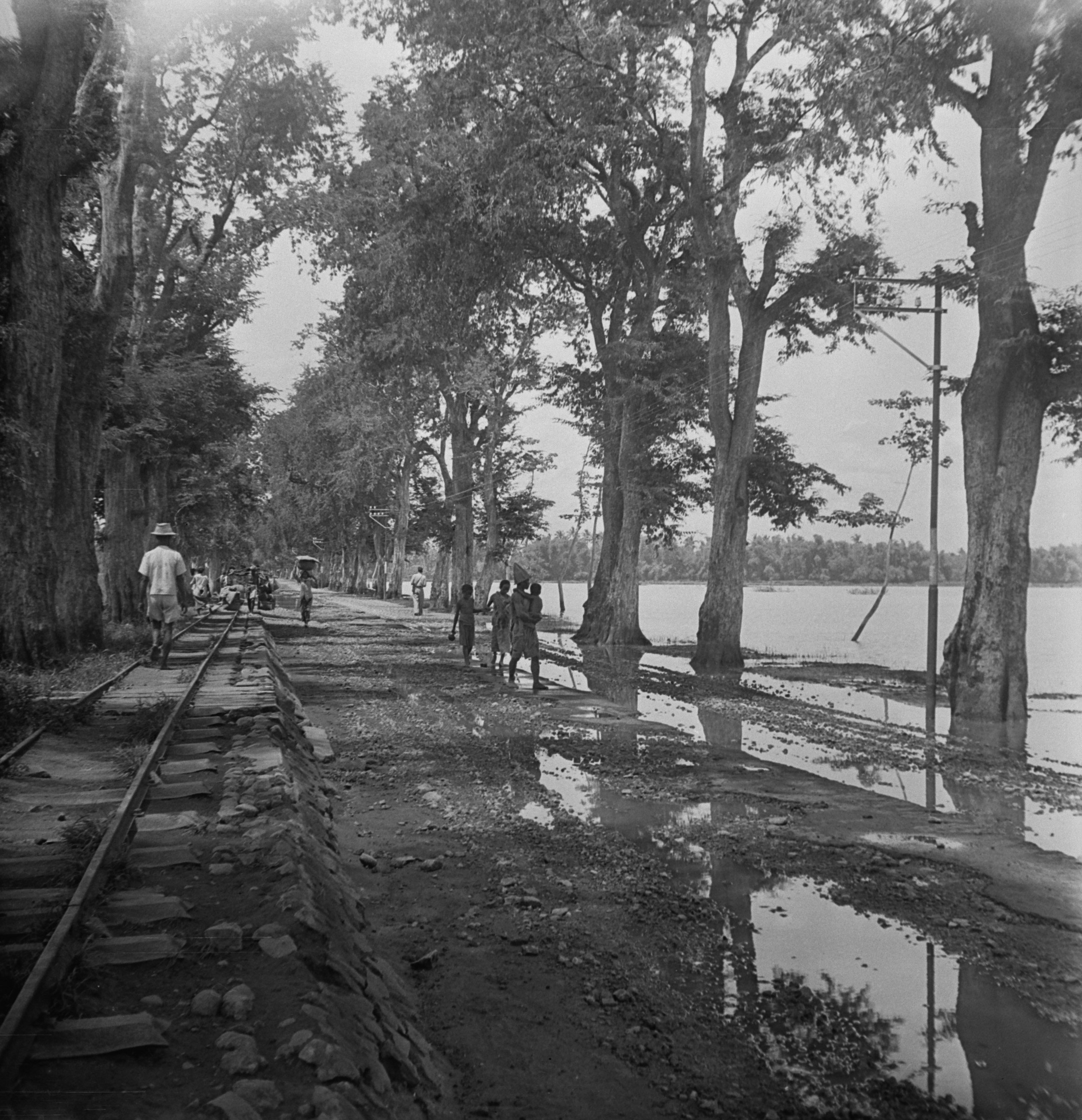 Collectie / Archief : Fotocollectie Dienst voor Legercontacten Indonesië Reportage / Serie : [DLC] Modjokerto Beschrijving : Weg langs een tramlijn en een rivier Datum : 1947/03/01 Locatie : Indonesië, Nederlands-Indië Fotograaf : Fotograaf Onbekend / DLC Auteursrechthebbende : Nationaal Archief Materiaalsoort : Negatief (zwart/wit) Nummer archiefinventaris : bekijk toegang 2.24.04.03 Bestanddeelnummer : 11152